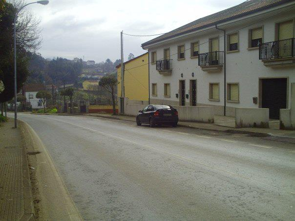 O Sandino